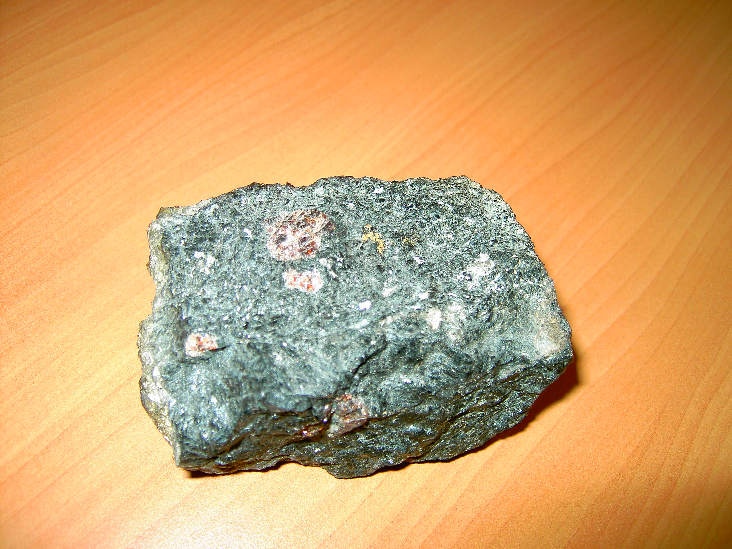 Выделения граната в ультраосновной породе (р.Барбитай, Саяны)